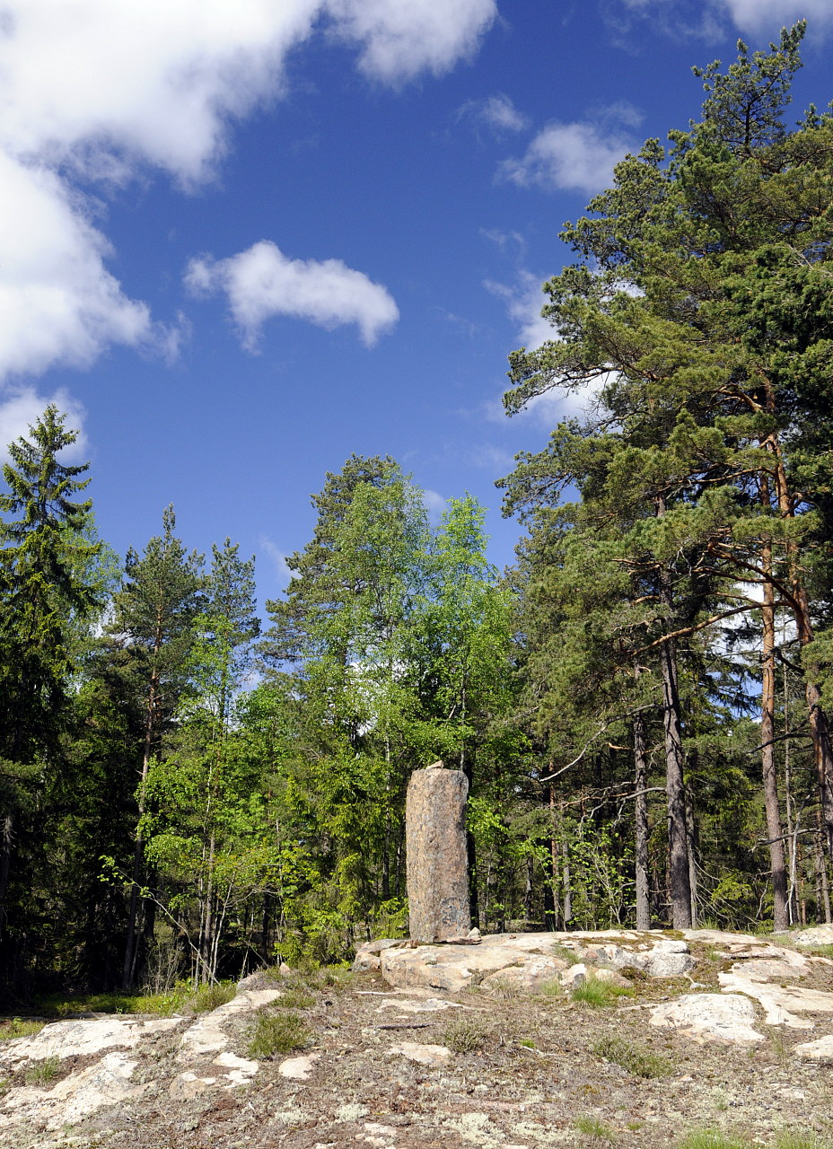 Sokkelen til siktebordet. Selve siktebordet er ikke på plass